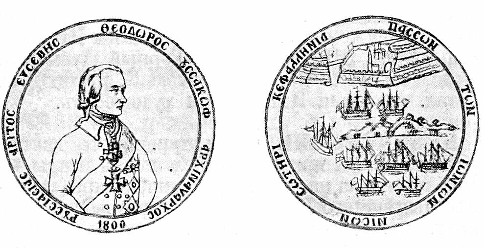 Это изображение было использовано для иллюстрирования статьи «Кефалония» опубликованной в двенадцатом томе «Военной энциклопедии», который был издан книгоиздательским товариществом И. Д. Сытина в 1913 году в столице Российской империи городе Санкт-Петербурге. В 1800 году, при уходе русского флота с Ионических островов в Черное море кефалонийцы, в знак признательности, поднесли Ушакову большую золотую медаль с изображениями адмирала (надпись вокруг: «Доблестный благочестивый Федор Ушаков, главнокомандующий русским флотом»), крепости Корфу и островка Видо, между которыми стоят 2 французских корабля, а перед Видо — 6 русских кораблей (надпись: «Всех Ионических островов спасителю Кефалония»). Более подробное описание к этой картинке можно прочесть в указанной выше статье.